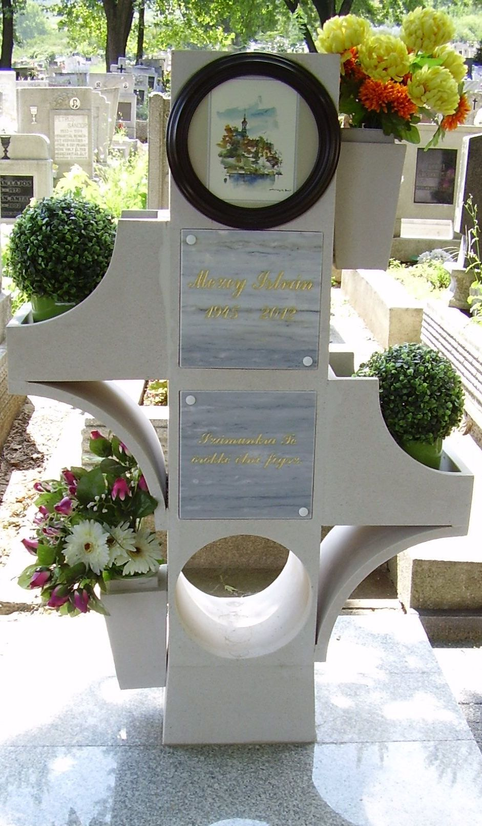 Mezey István festő- és grafikusművész síremléke. Kazincbarcikai temető.